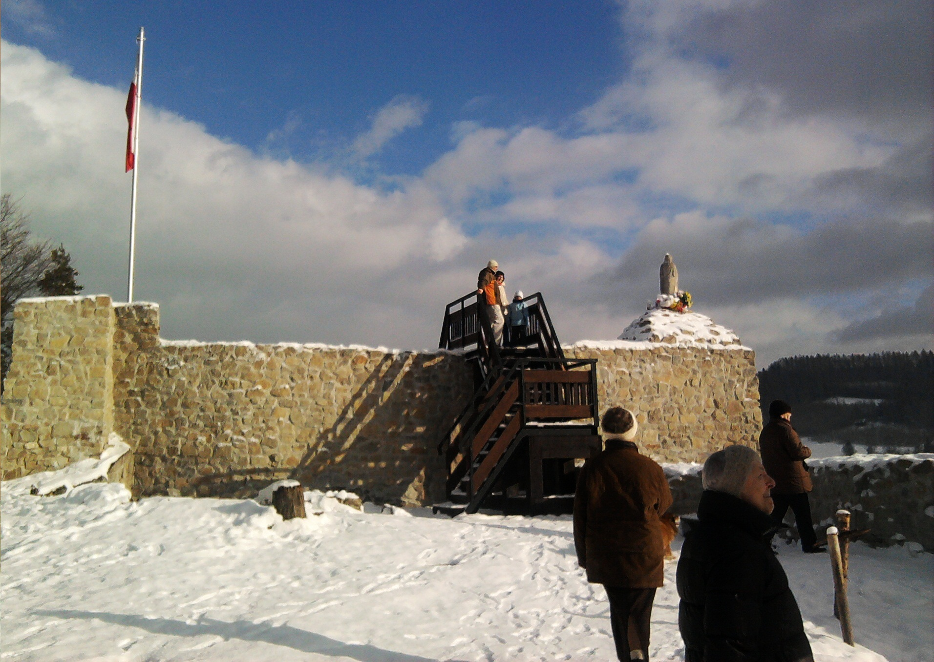 Ruiny zamku w Muszynie....